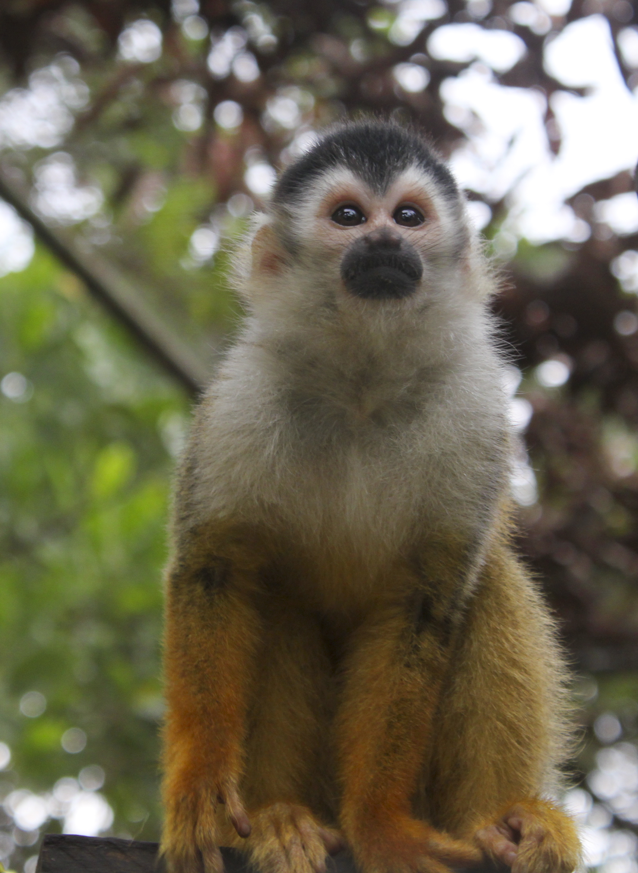 Mittelamerikanische Totenkopfaffe oder Rotrücken-Totenkopfaffe (Saimiri oerstedii)